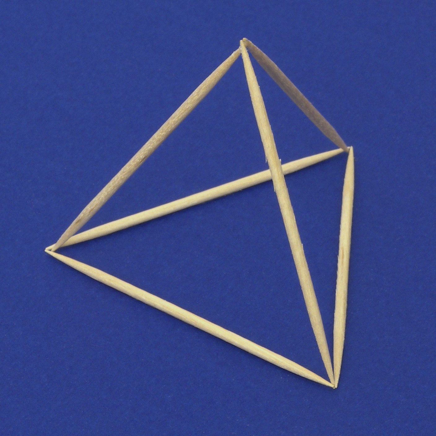 Illustrazione di un aneddoto attribuito ad Albert Einstein. Ad un convegno di fisici, subissato dalle critiche per la sua balzana concezione di uno spaziotempo a quattro dimensioni, egli propose il problema: "Dati sei stuzzicadenti, costruire quattro triangoli equilateri". Nessuno dei presenti riuscì a posizionare su di un piano gli stuzzicadenti per formare i triangoli richiesti, il che è infatti impossibile, al che Einstein, con i sei stuzzicadenti, compose un tetraedro, e disse: "Se non sapete usare la terza dimensione, che sperimentate tutti i giorni, come sperate di capire la quarta?"